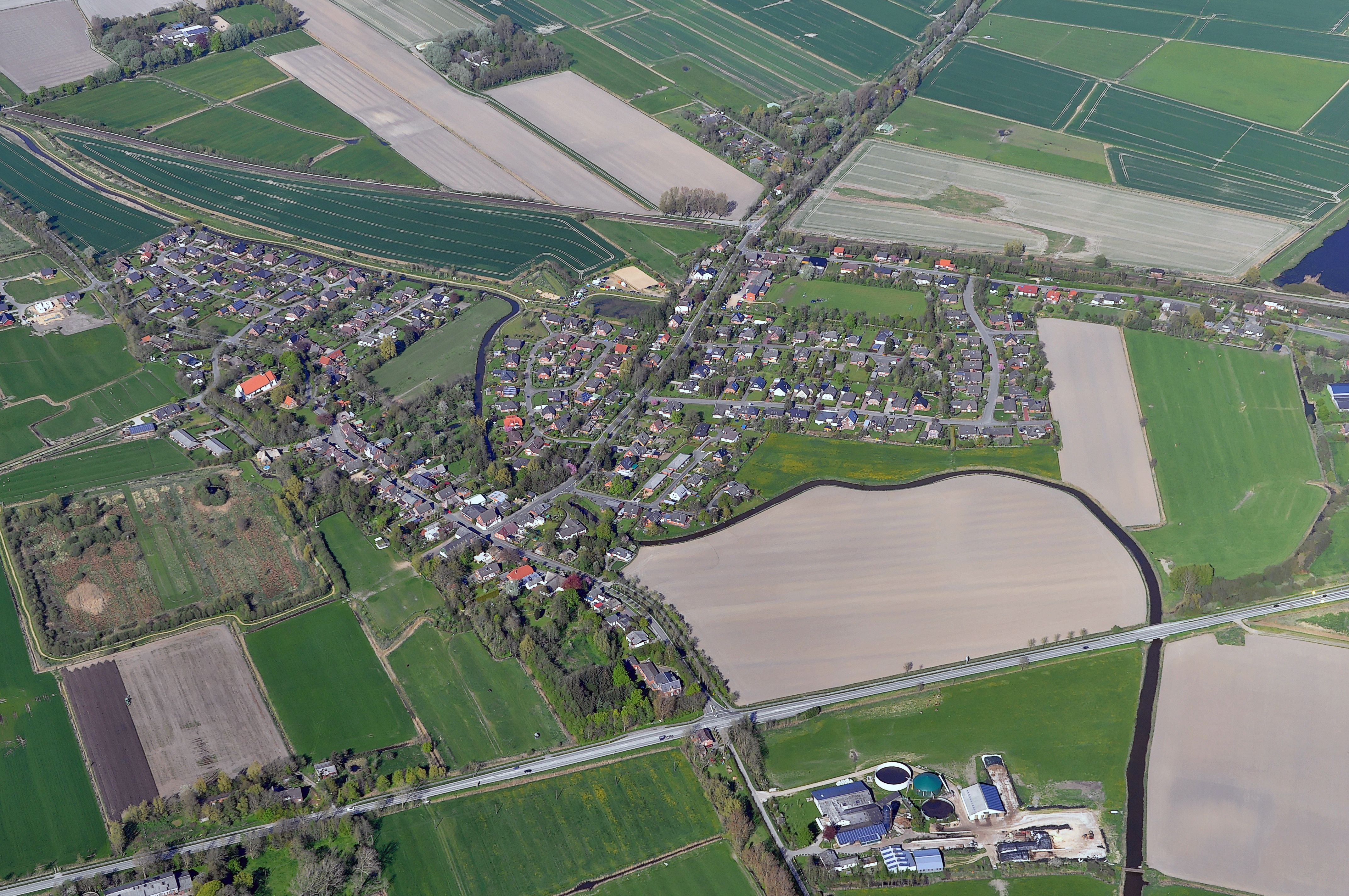 Luftbilder von der Nordseeküste 2012-05